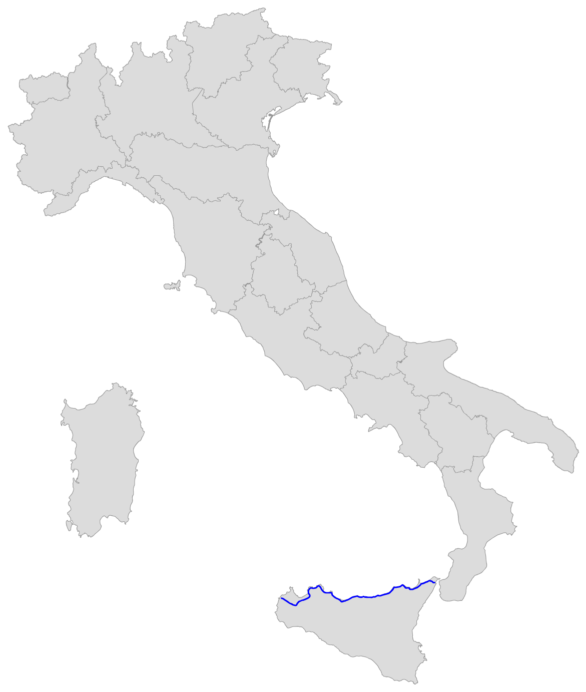 Percorso della SS 113 Settentrionale Sicula